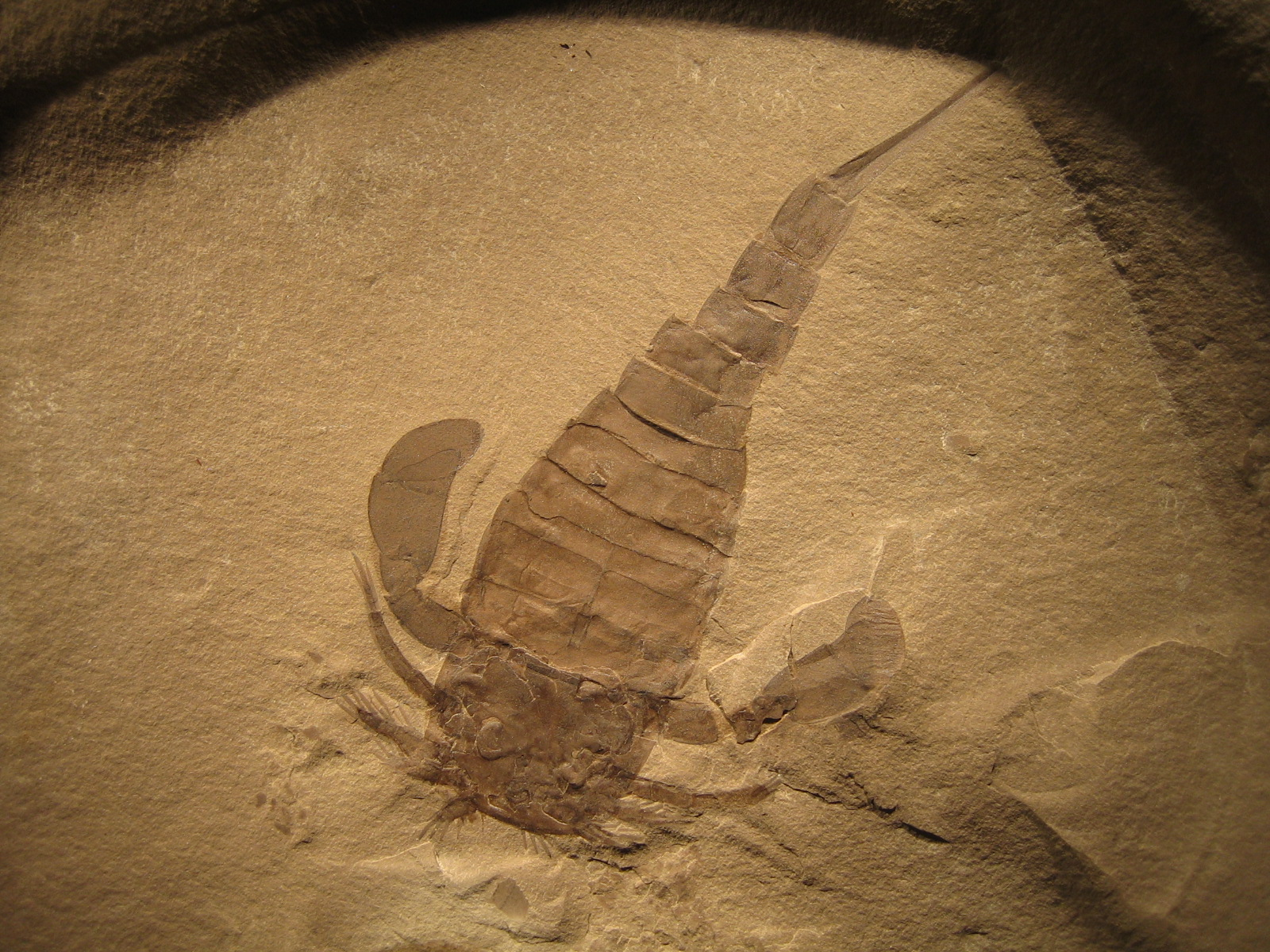 Eurypterus remipes in Cosmocaixa, Barcelona